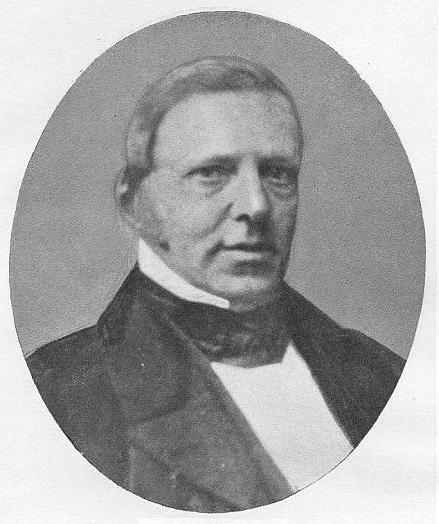 Carel Gabriel Cobet (1813–1889), französischer Philologe.